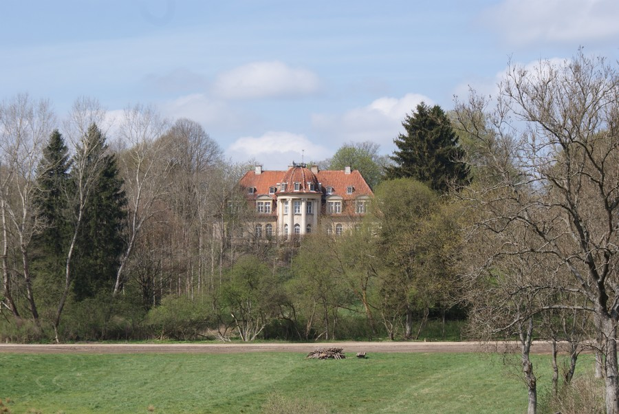 Dwór w Kłaninie